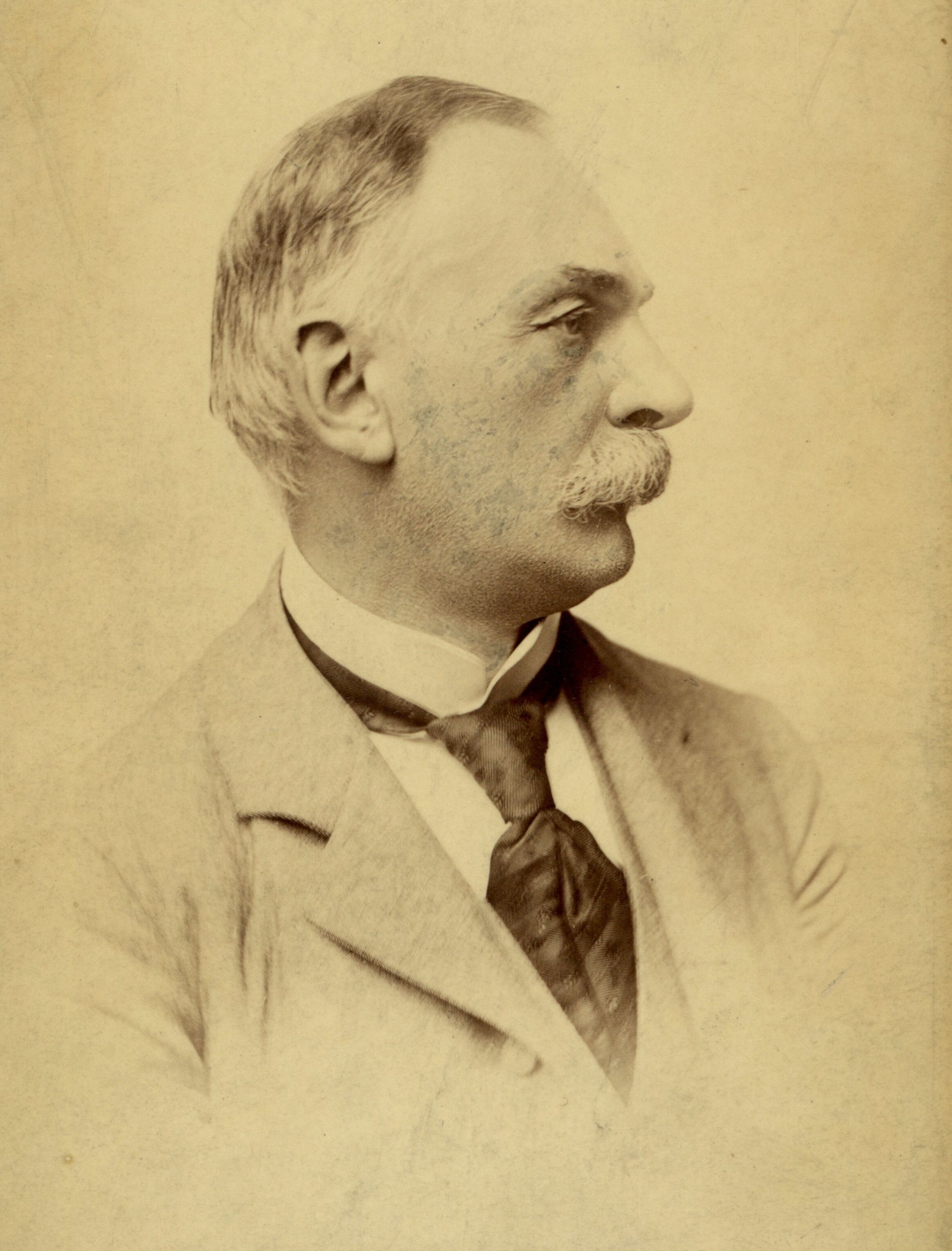 Władysław Żeleński [post 1894], kompozytor i pianista.